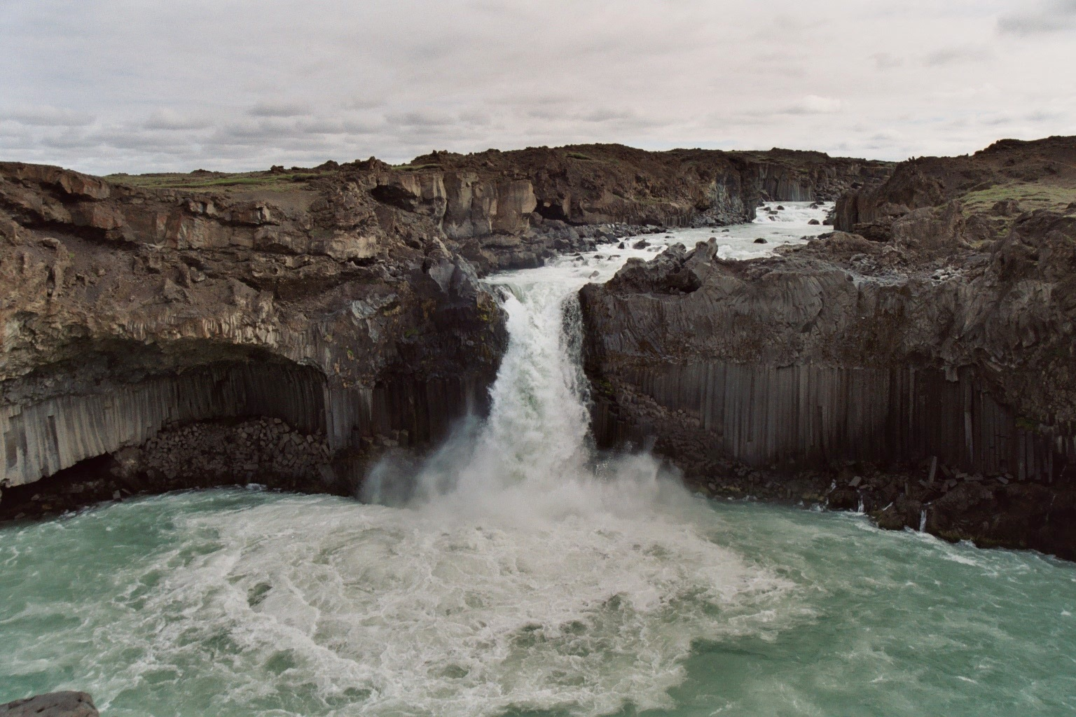 Vue sur la cascade d'Aldeyarfoss, en Islande La photographie a été prise, photographie numérisée à partir d'une pellicule argentique. Voir la page sur Aldeyjarfoss pour plus d'informations sur le lieu.